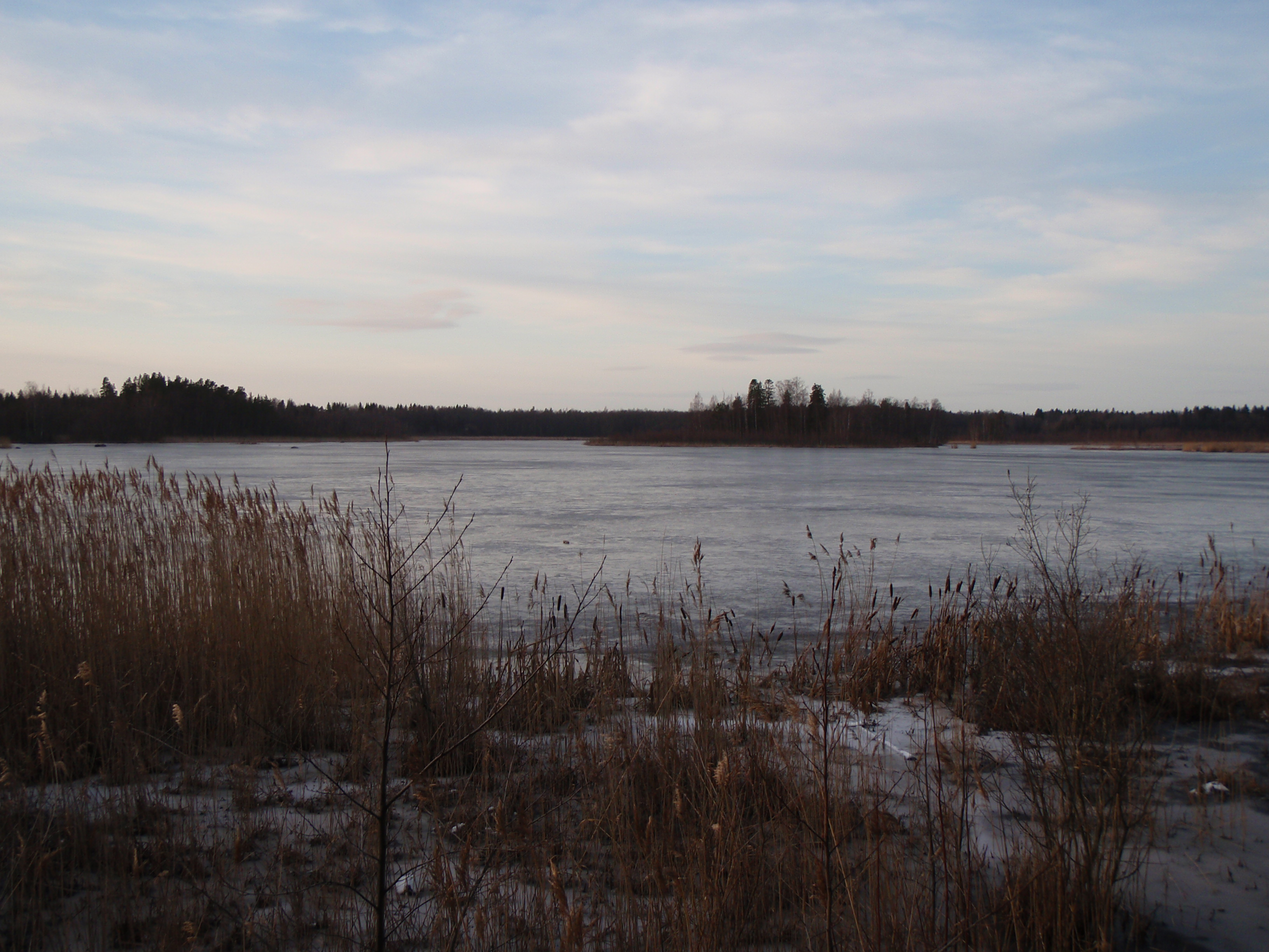 Enäjärvi nähtynä koillispuolelta.